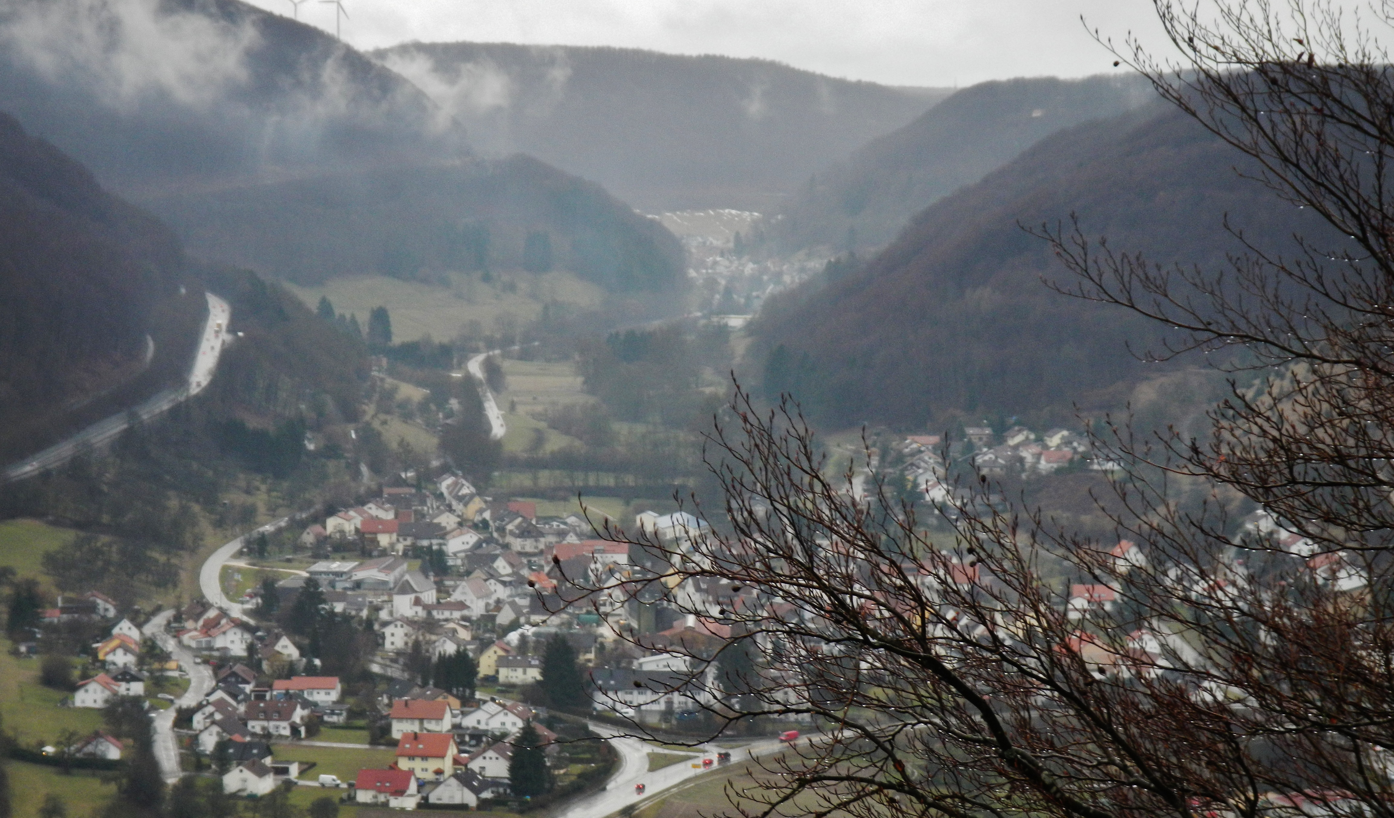 Ausblick von der Kreuzkapelle nach Mühlhausen und A8 Aufstieg Drackensteiner Hang